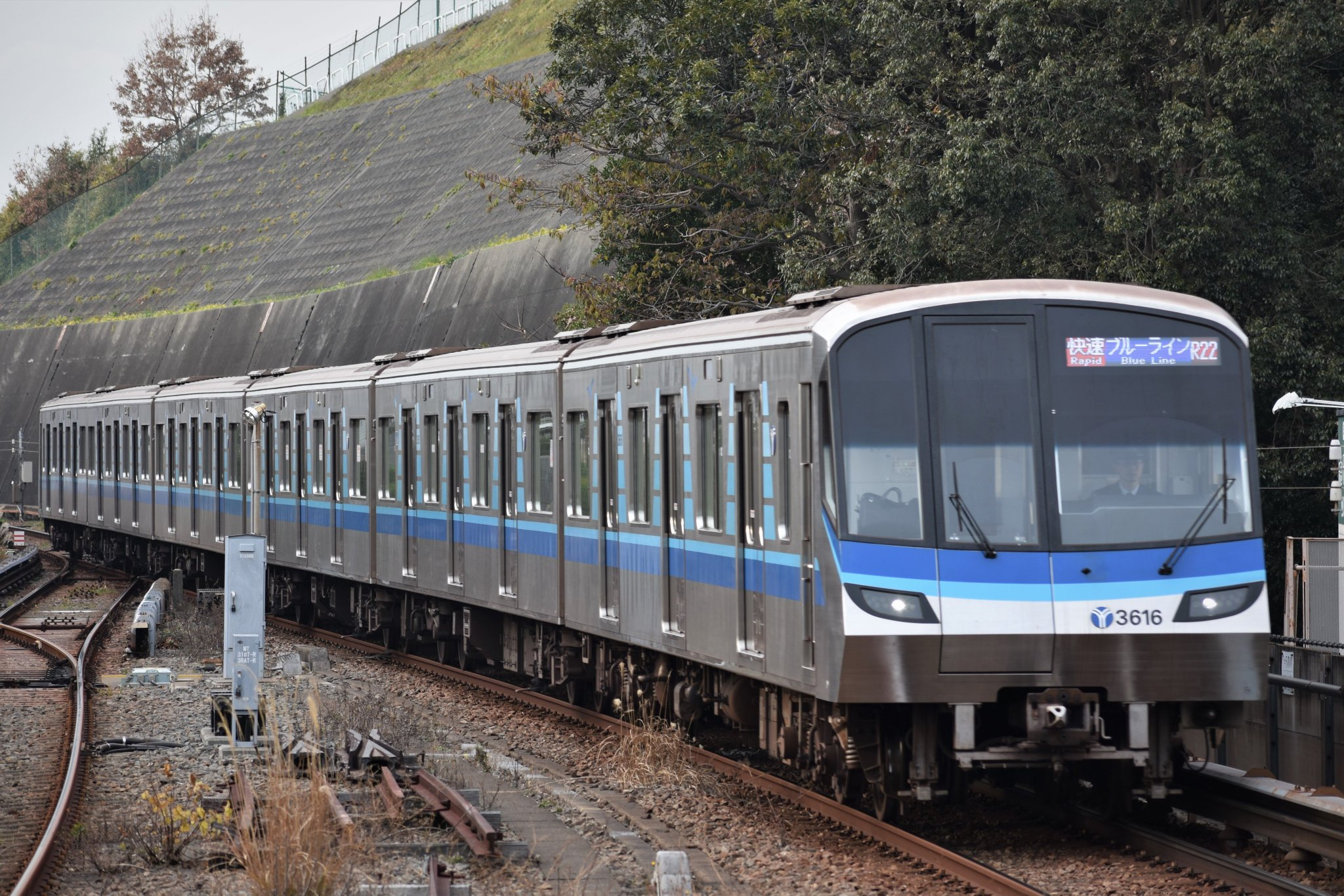 横浜市営地下鉄ブルーライン上永谷駅